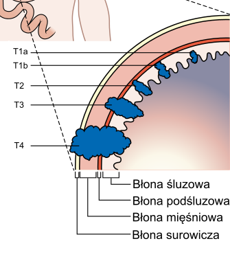 Cechy T w TNM raka żołądka